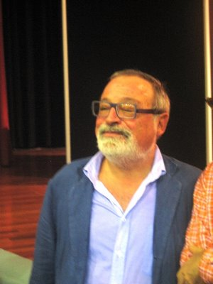 Acto fundacional UPD. Fernando Savater.